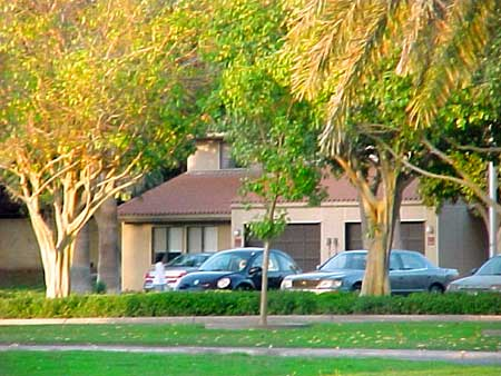 Casas en las Colinas de Dhahran City:Dhahran Townhouses in the Hills.